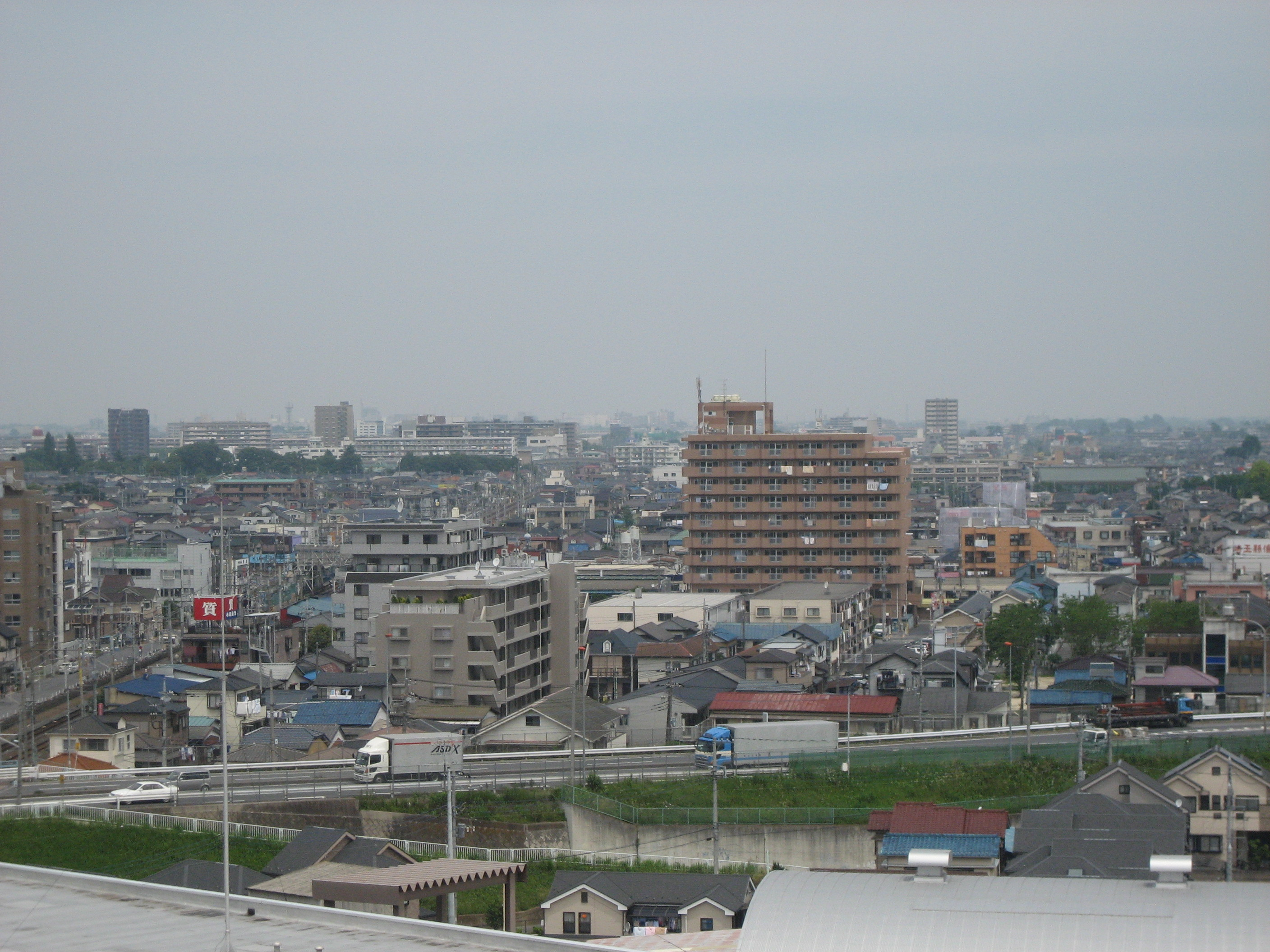 越谷市上空大袋せんげん台方面